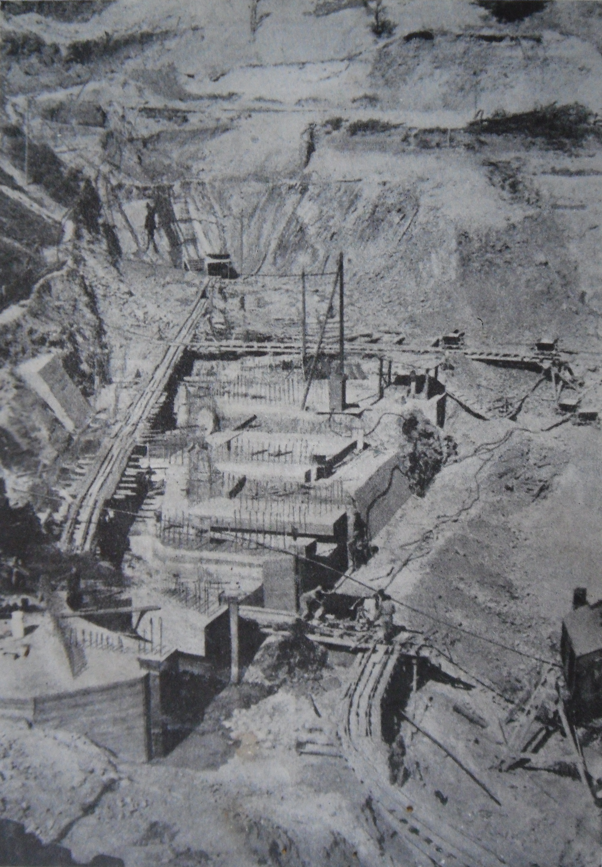 Fundația hidrocentraei de la Stejarul (Bicaz).